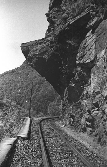 Plazaolako treneko trenbidea, Leitzaranen